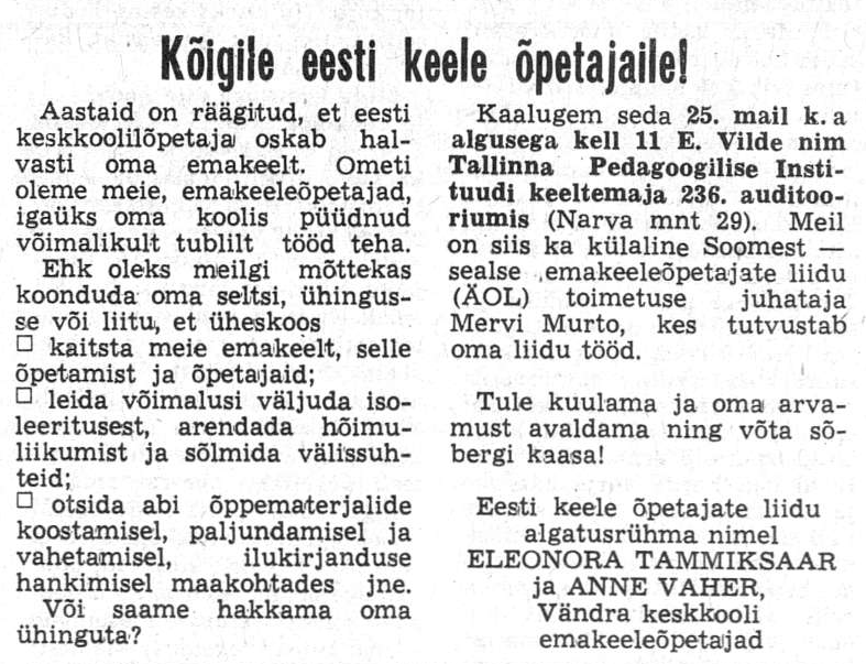 20. mail 1989 ilmus Nõukogude Õpetajas üleskutse "Kõigile eesti keele õpetajaile!". Foto: Monika Undo